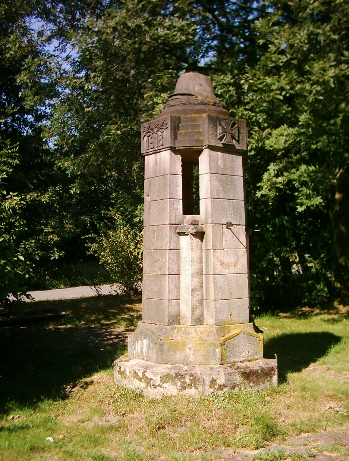 Denkmal des Ersten Weltkriegs auf dem Gelände der Kirche St. Gertrud in Hamburg-Altenwerder.